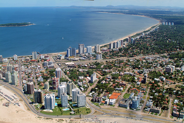 Foto aérea de Punta del Este. Avenida Chiverta. Playa Brava al frente y Playa Mansa al fondo.